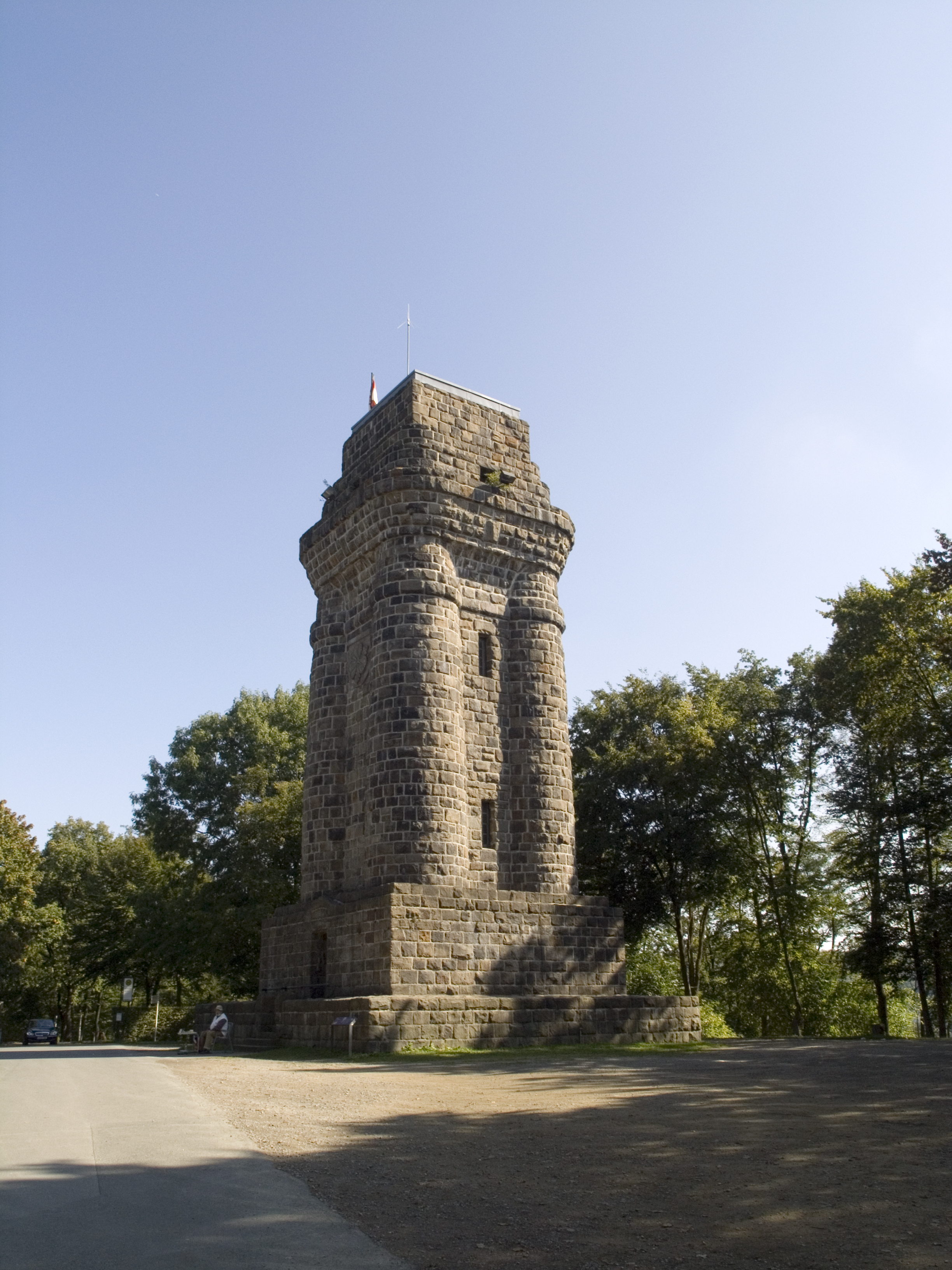 Северный Рейн-Вестфалия, Вупперталь - башня Бисмарка